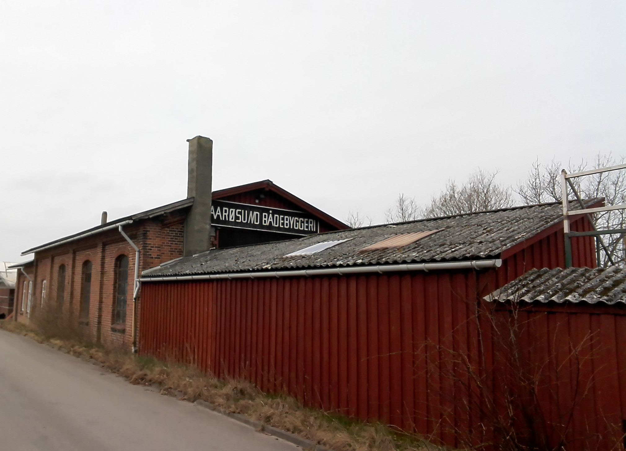 Årøsund Remise, nu Aarøsund Bådebyggeri, fra sydøst